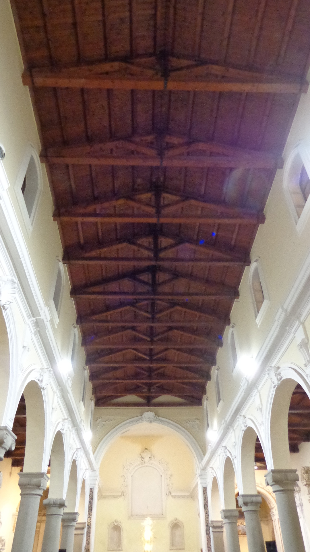 Pasqua 2016 11